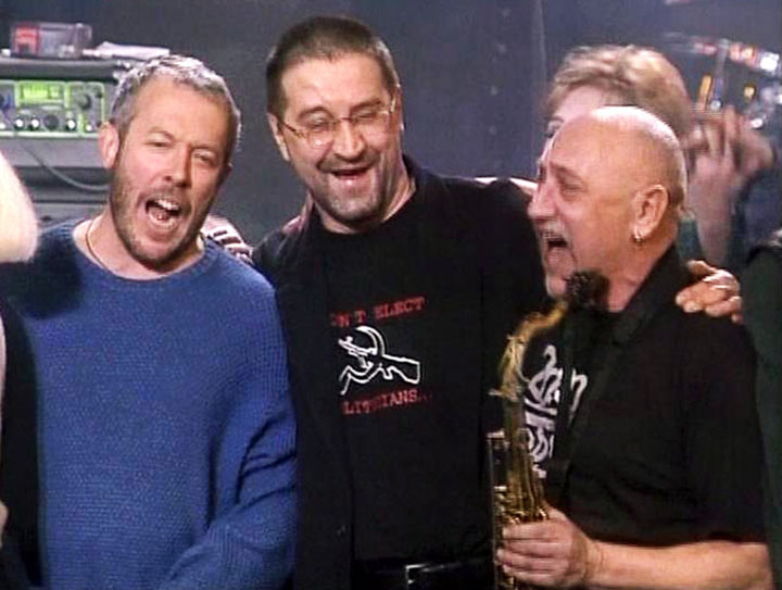 Цветы, 2001. Юбилейный концерт – 30. Мы желаем счастья вам